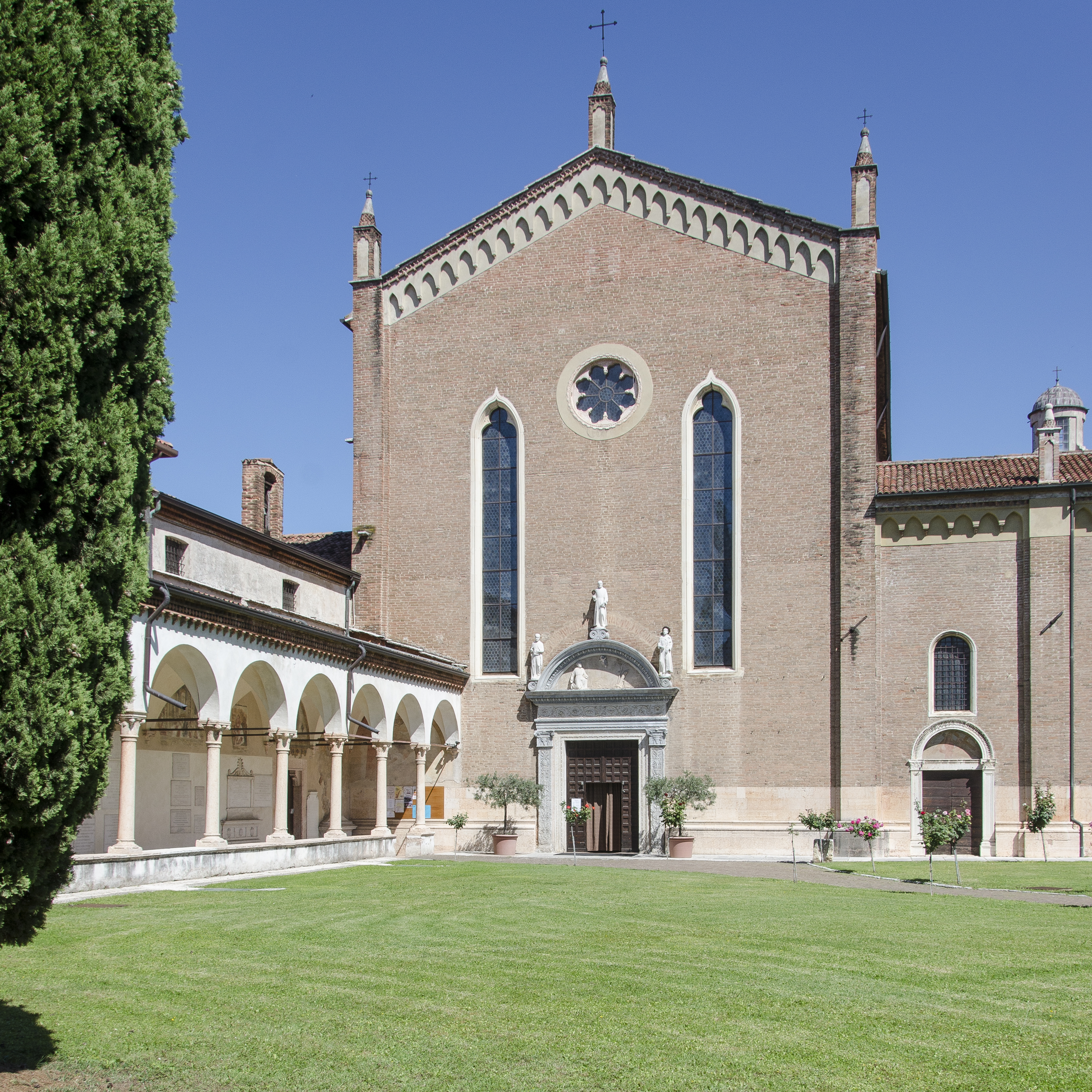 Chiesa di San Bernardino a Verona. Chiostro di Sant'Antonio